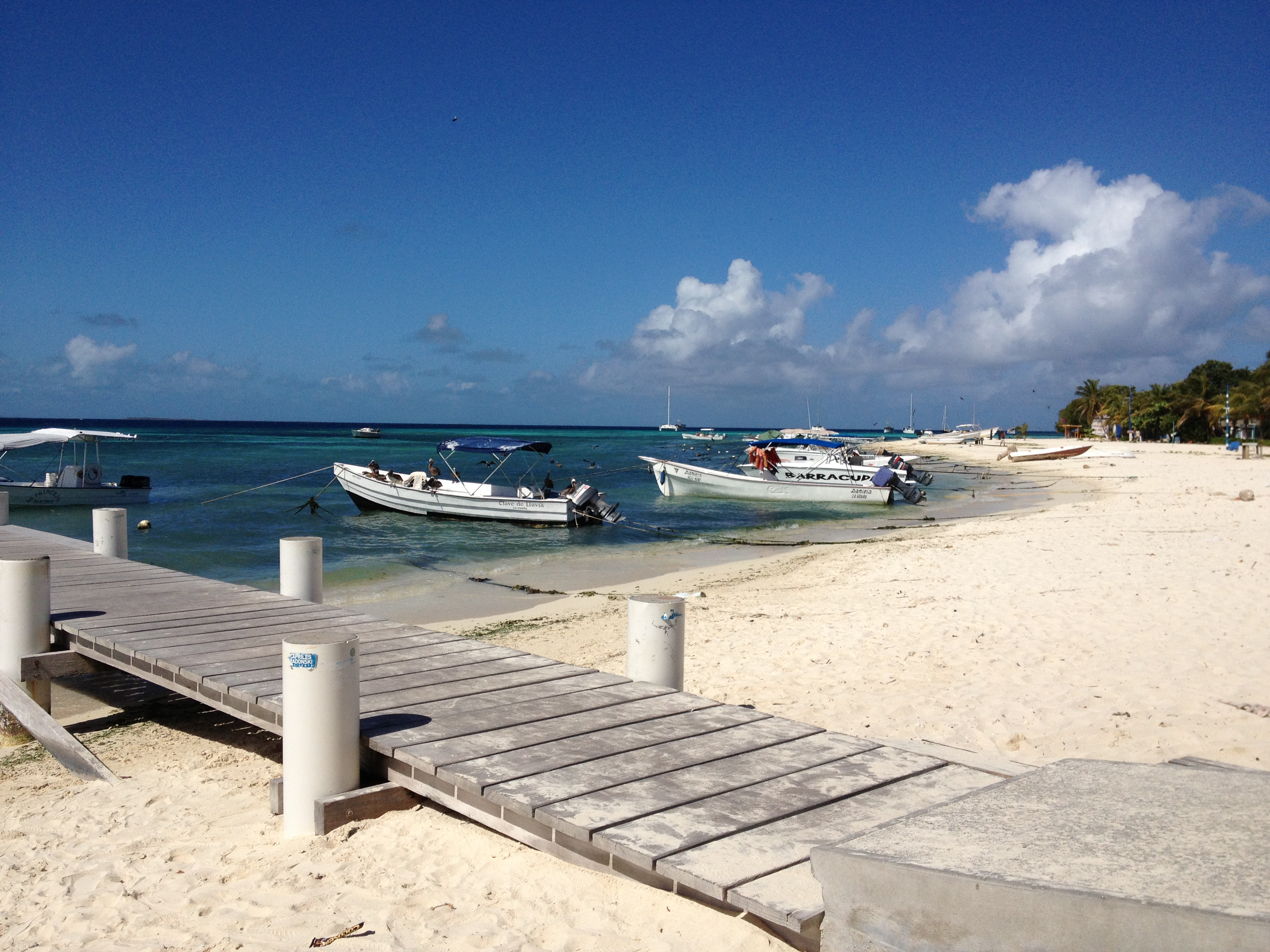 Los Roques